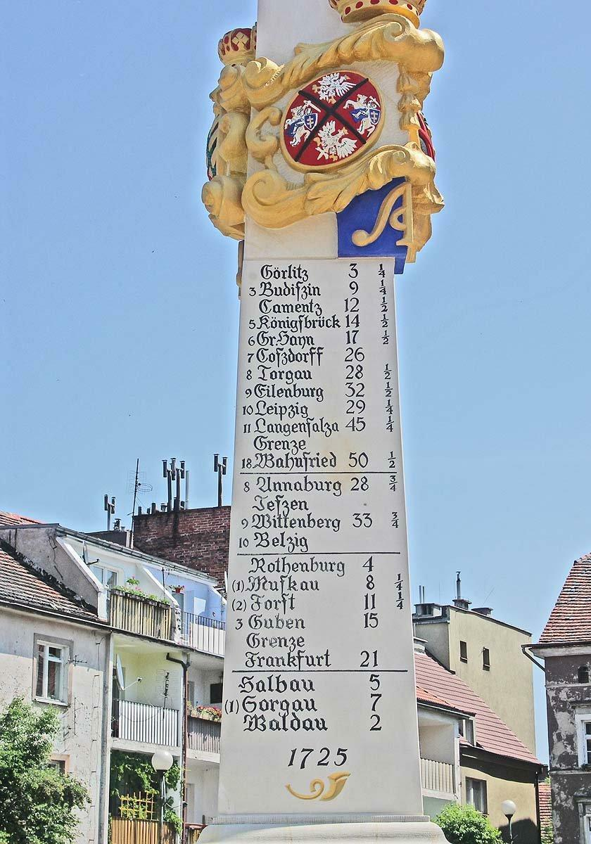 Odległości podane (według niektórych) w milach pruskich 1 mila = 7,5324 km, są tacy którzy twierdzą, że cyfry wskazują czas potrzebny na dotarcie do tych miejsc. Na słupie nie ma odległości do Wrocławia, ale do Lipska jest!